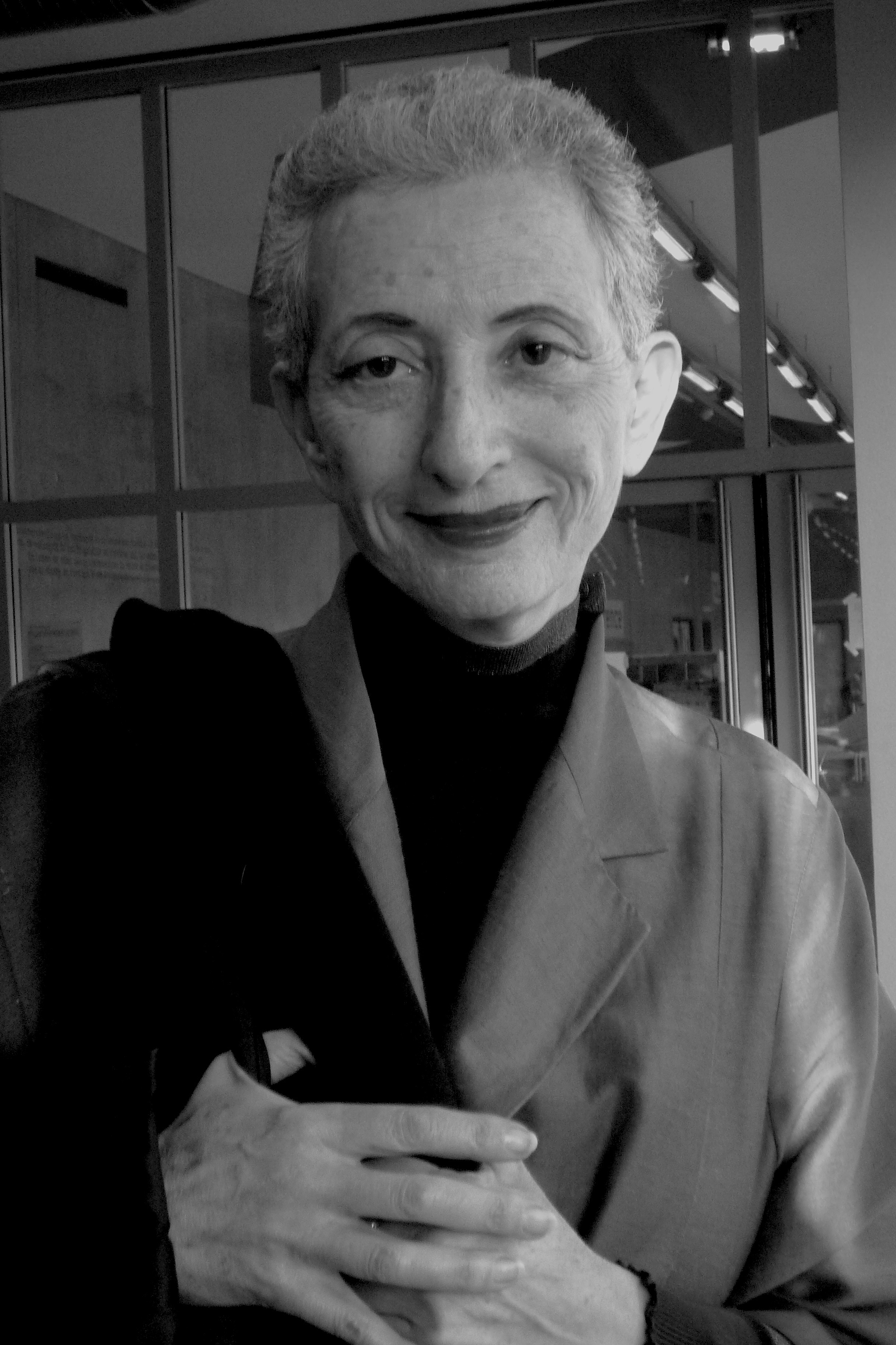 L’écrivain Hélène Cixous, 2011